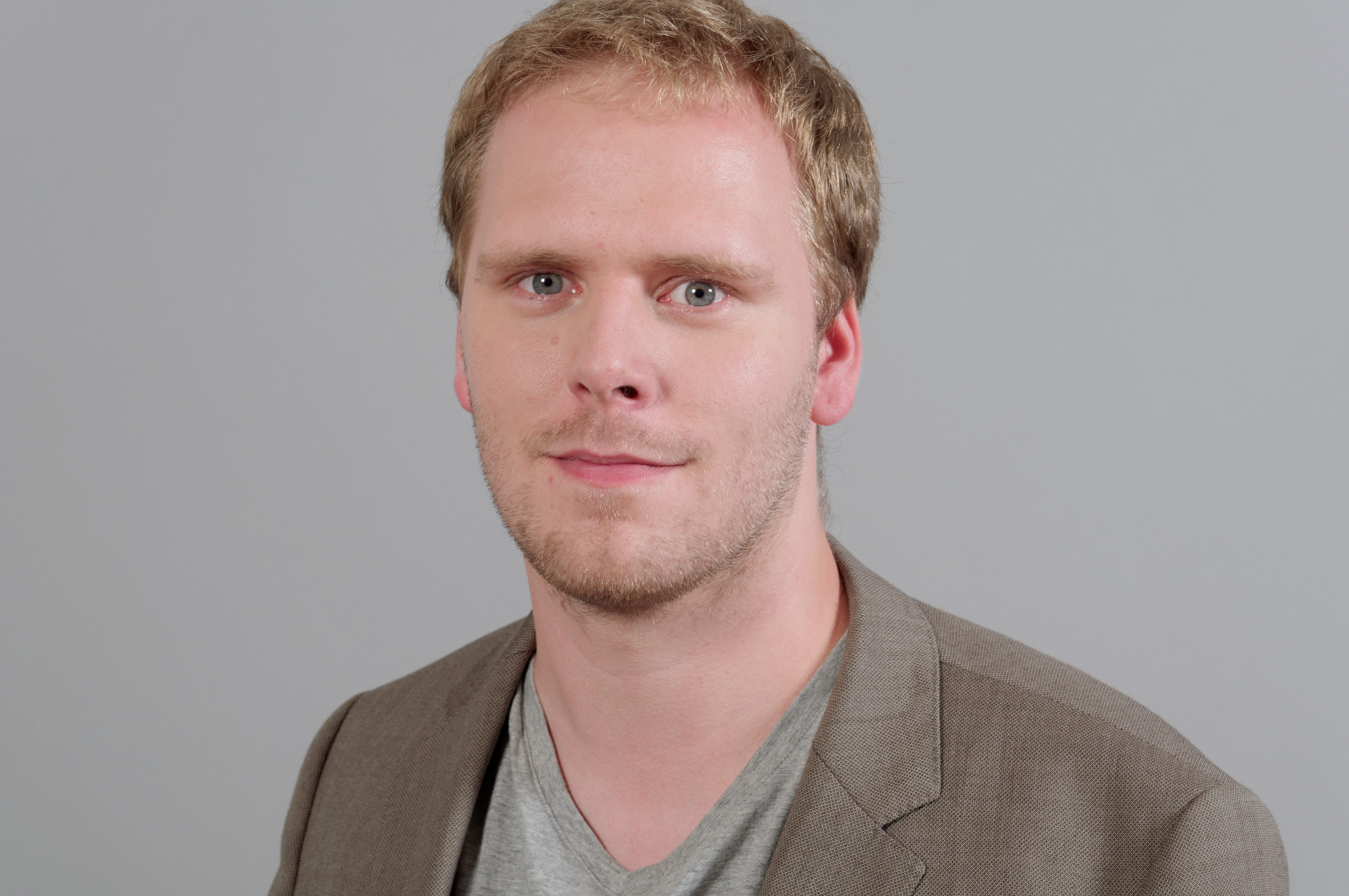 Torge Schmidt, PIRATEN